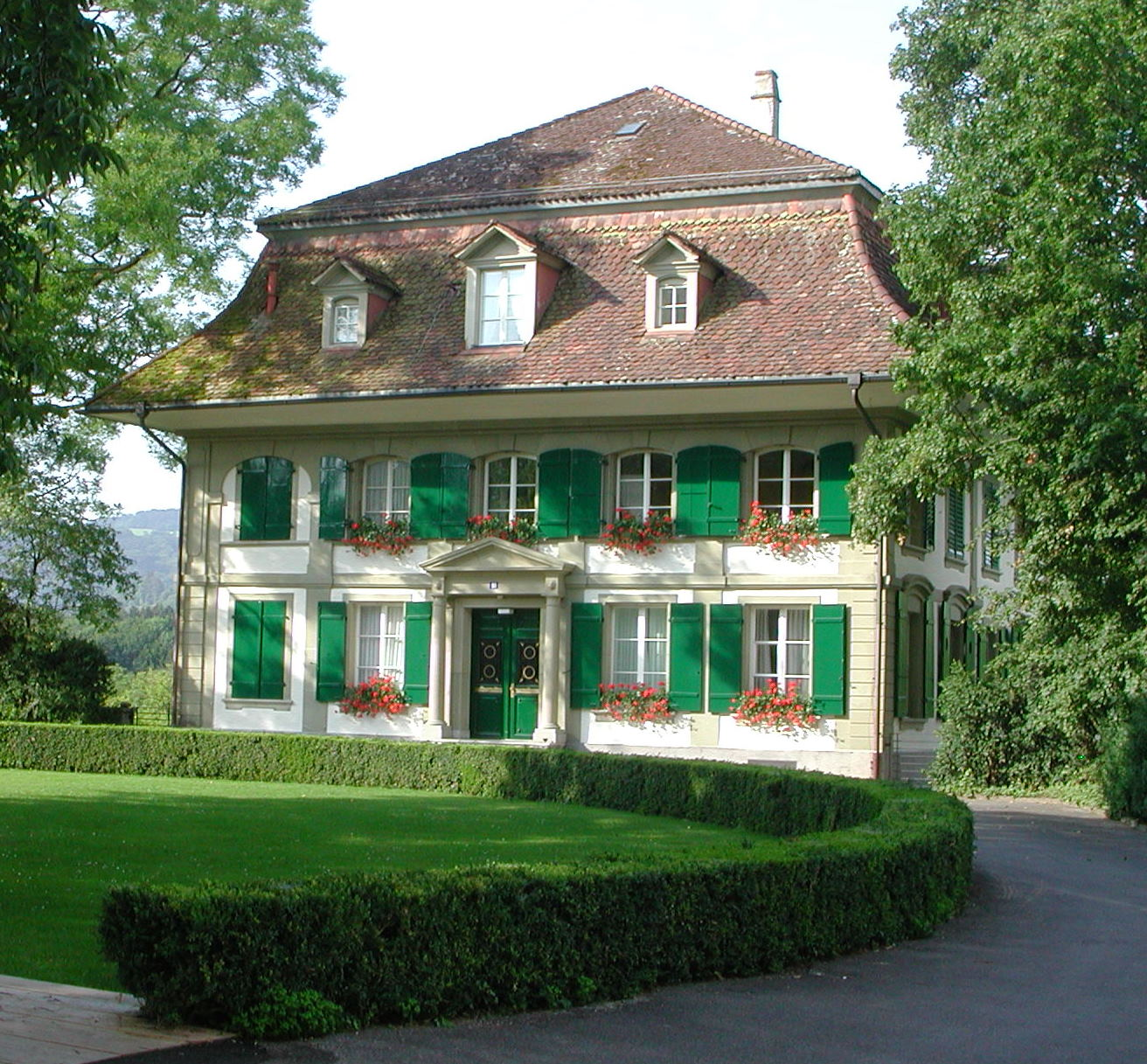 1 Campagne Elfenau